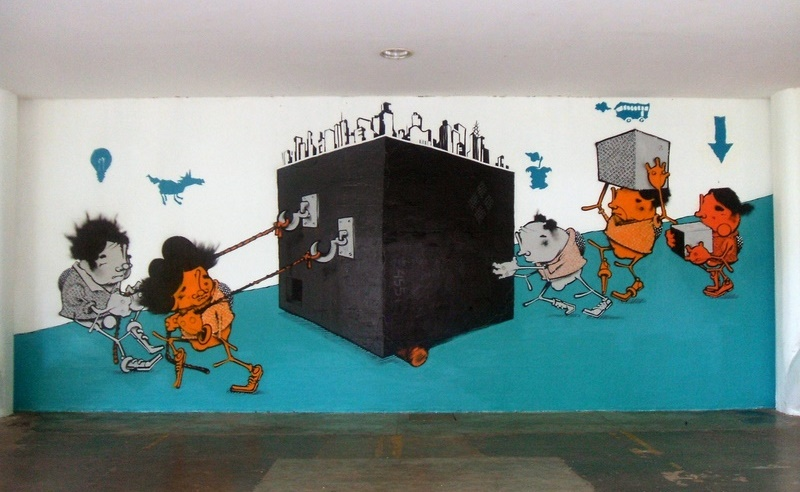 Grafite do Onesto, na parte externa do Museu Afro Brasil, no Parque do Ibirapuera, em São Paulo.